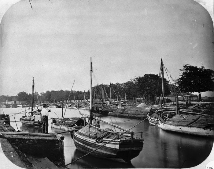 Foto. Schepen in de haven van Probolingo